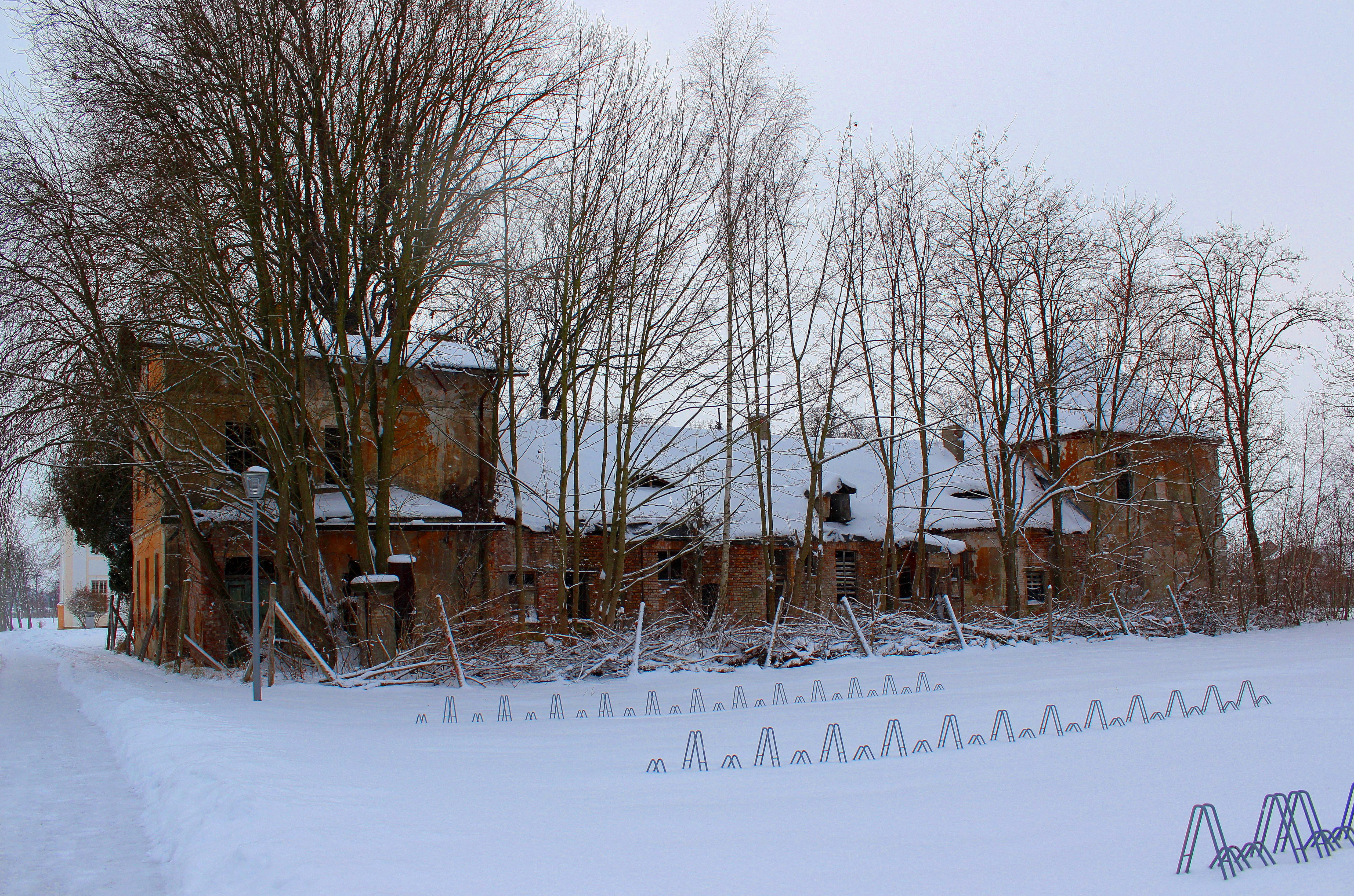 Orangerie des einstigen Schlosses Mückenberg.